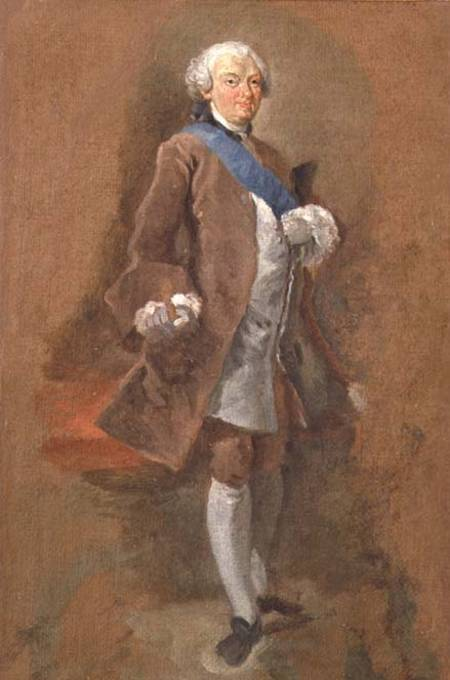 portrait du premier minister de Louis XV